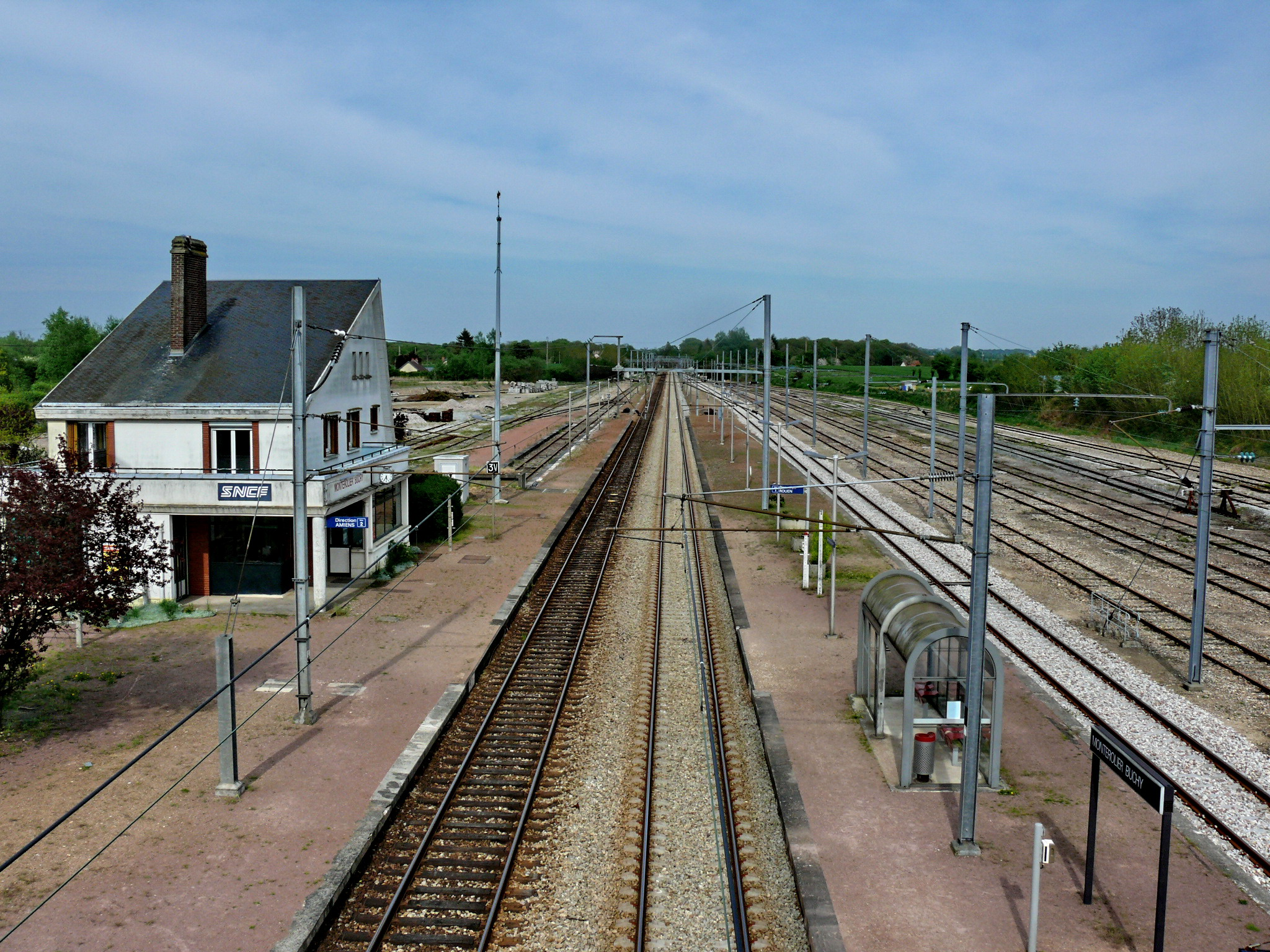 Intérieur de la Gare de Montérolier-Buchy (vers Amiens)